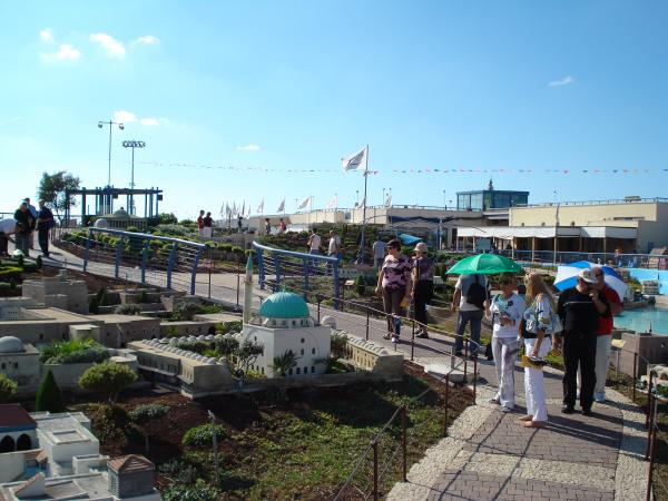 דגם